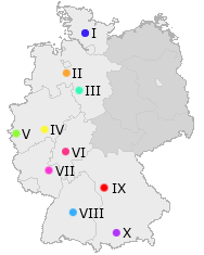 Lage der 10 Warnämter